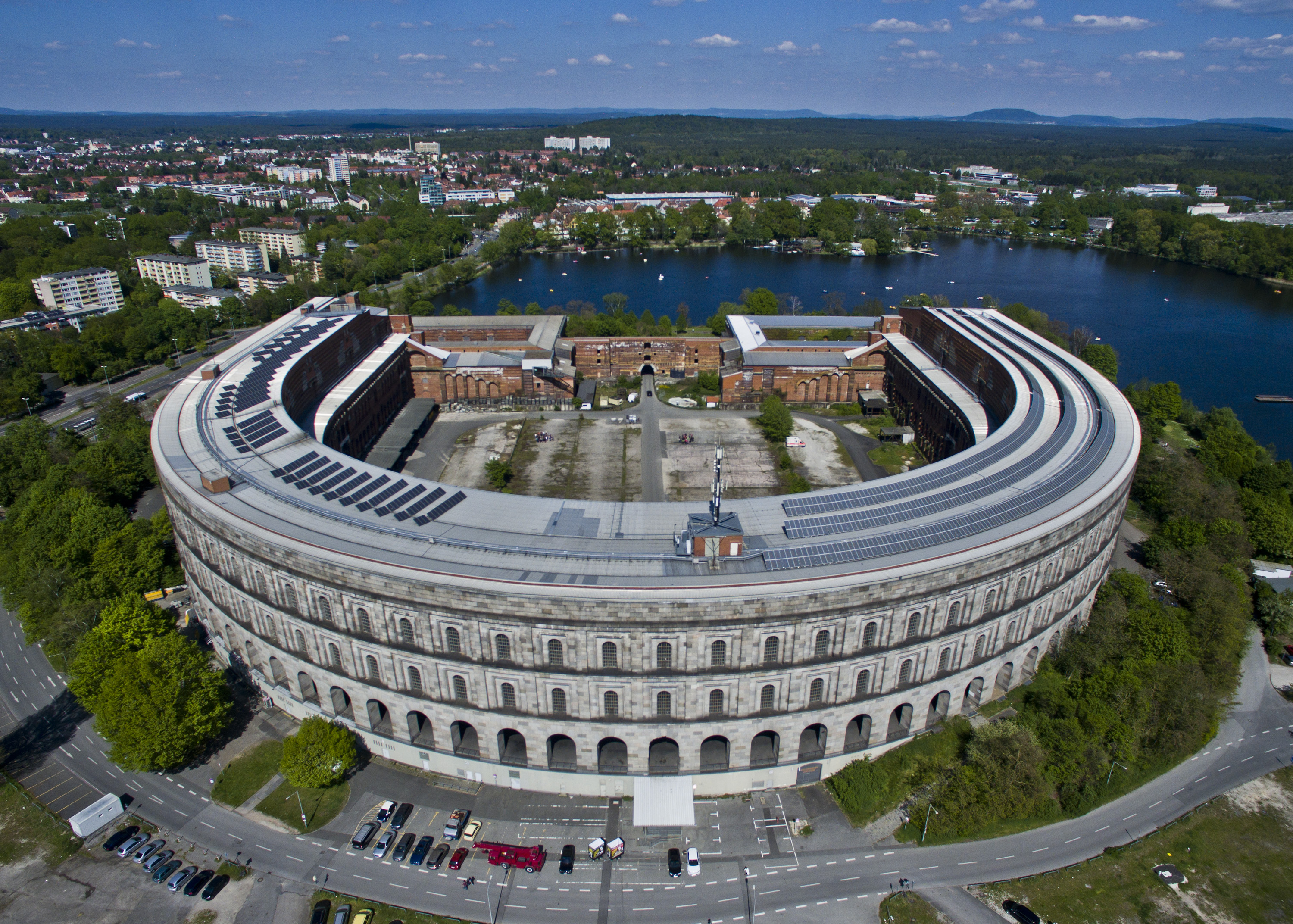 Kongresshalle, jetzt sogenannter Ausstellungsrundbau.Volkspark Dutzendteich (Bayernstraße 100 / 110) Nürnberg